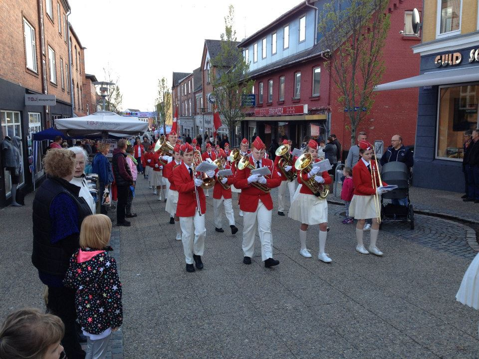 Hadsund Skole-Orkester, optræder i Hadsund under Mariagerfjord Festuge